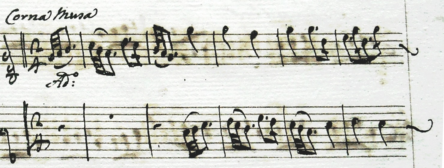 Paolo Benedetto Bellinzani - Intavolatura di 144 versetti per organo - Tono di SOL III Versetto